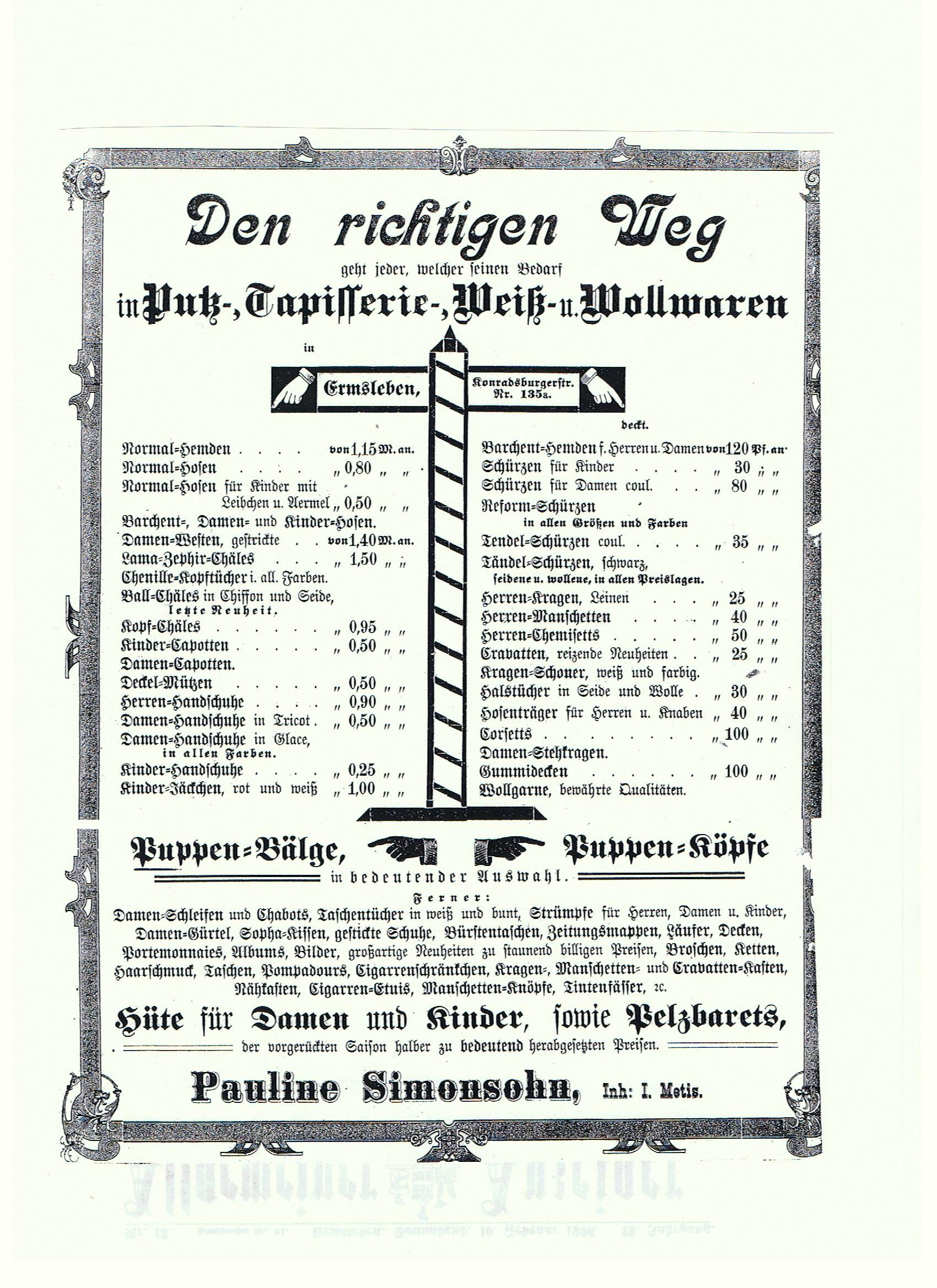 die Anzeige aus der Zeitung "der Anzeiger" zeigt eine Preisliste des Geschäftes von Methis/ Simonsohn